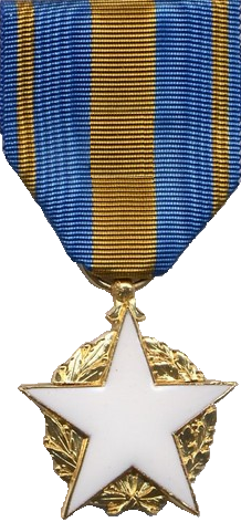 Insigne des blessés civils (France)